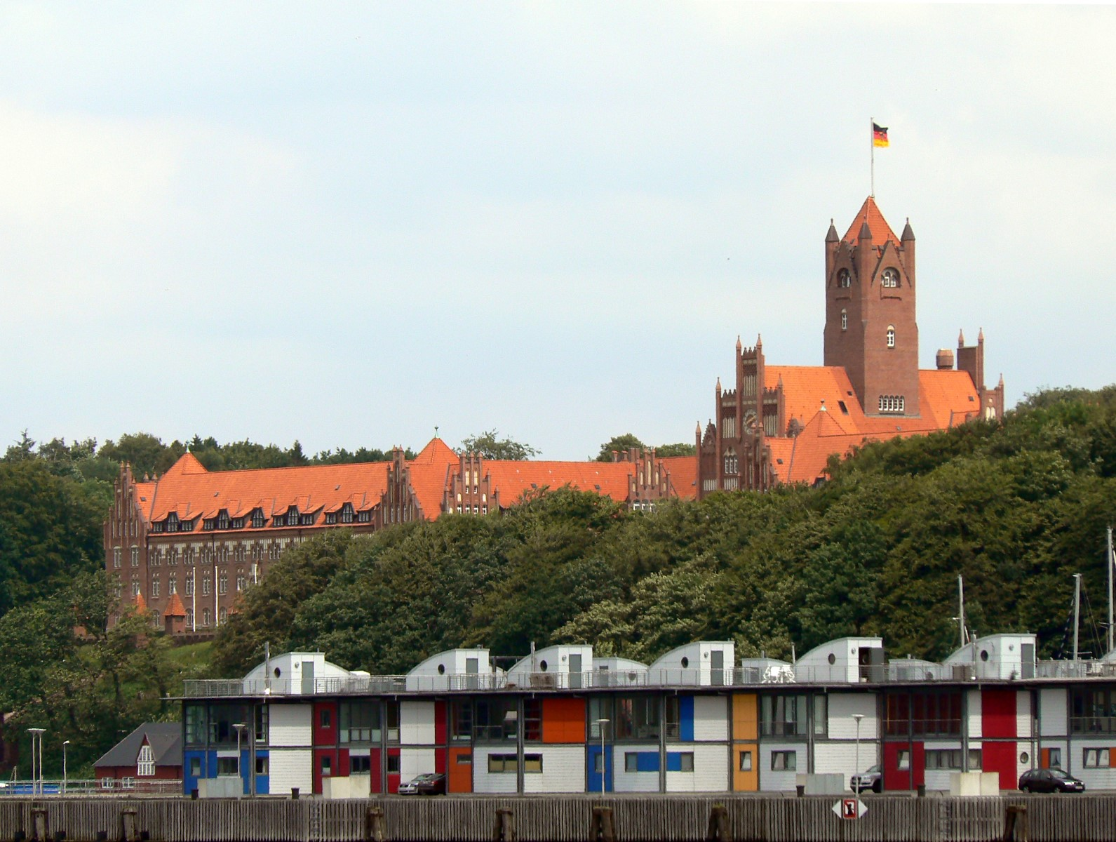 Die Wasserhäuser an der Marina Sonwik vor der Marineschule Mürwik in Flensburg.